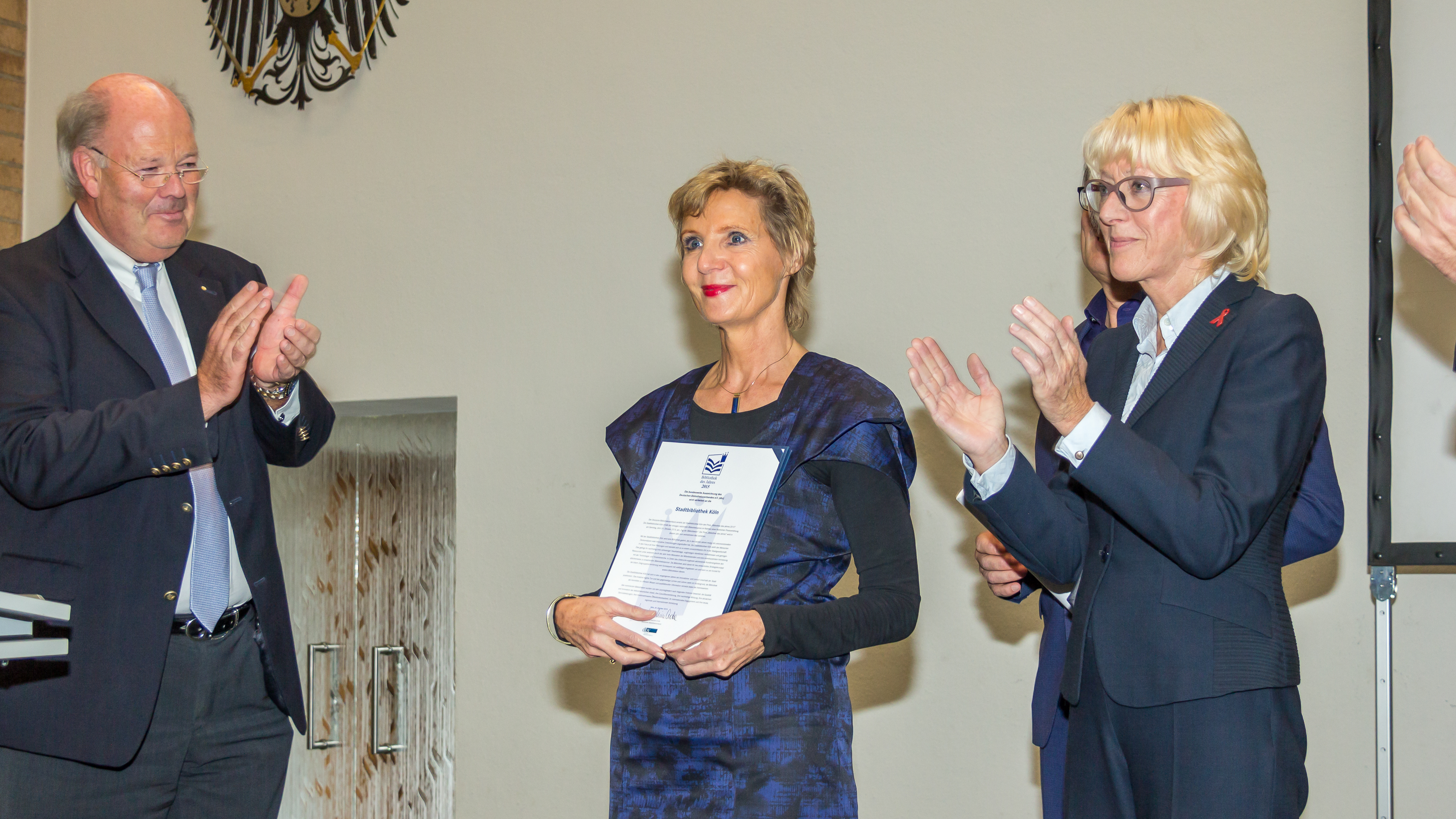 Auszeichnung an die Stadtbibliothek Köln zur „Bibliothek des Jahres 2015“ Foto: Auszeichnung durch den Präsidenten des Deutschen Bibliotheksverbandes Hans-Joachim Grote (Oberbürgermeister der Stadt Norderstedt) an die Direktorin Dr. Hannelore Vogt. Daneben: Bürgermeisterin Elfi Scho-Antwerpes